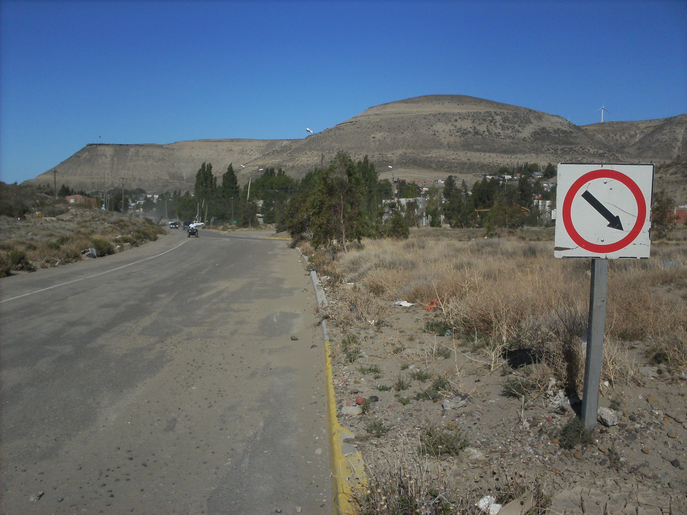 Vista de las puertas de la localidad, hoy siendo un solo un barrio, de fonde el cerro viteau